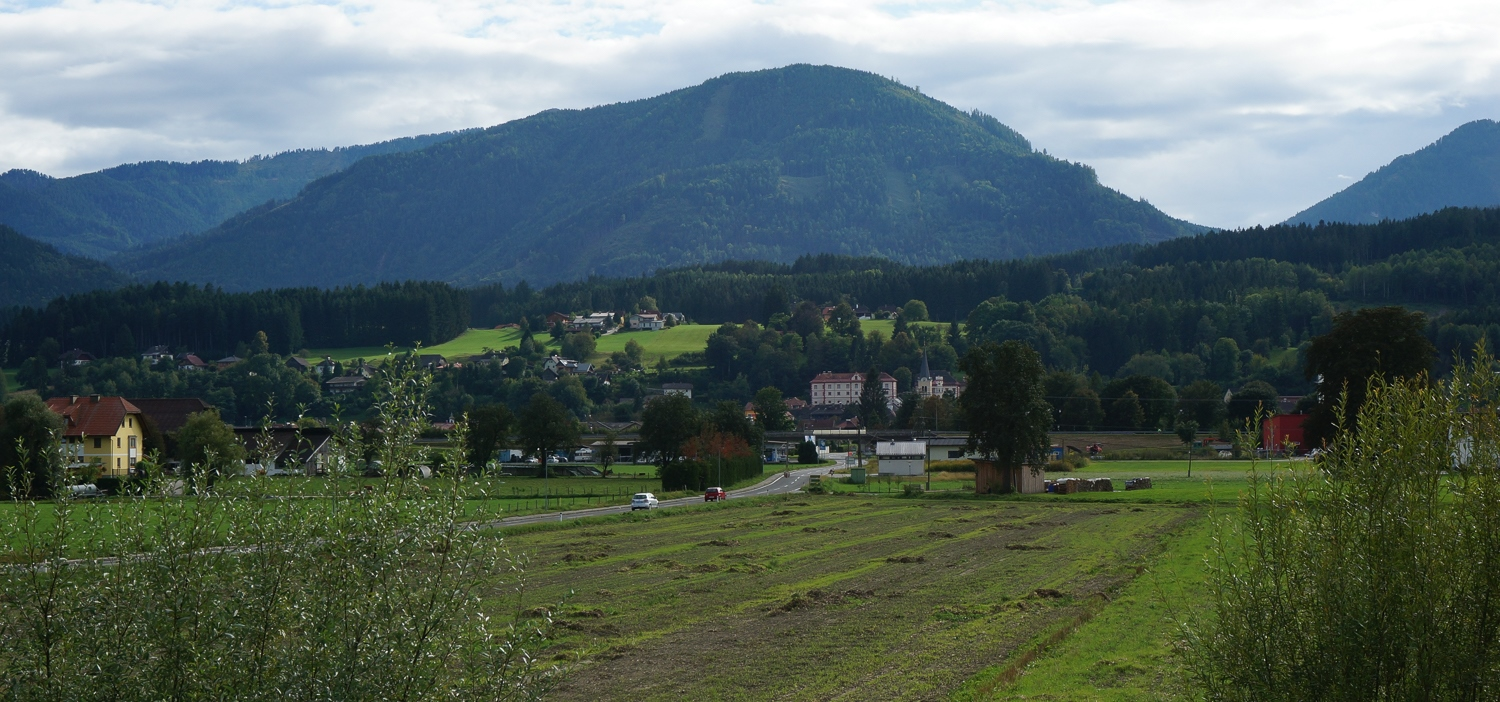 Marktgemeinde Paternion mit Blick zum Schloss Paternion im Bezirk Villach Land, Kärnten, Österreich, Europäische Union